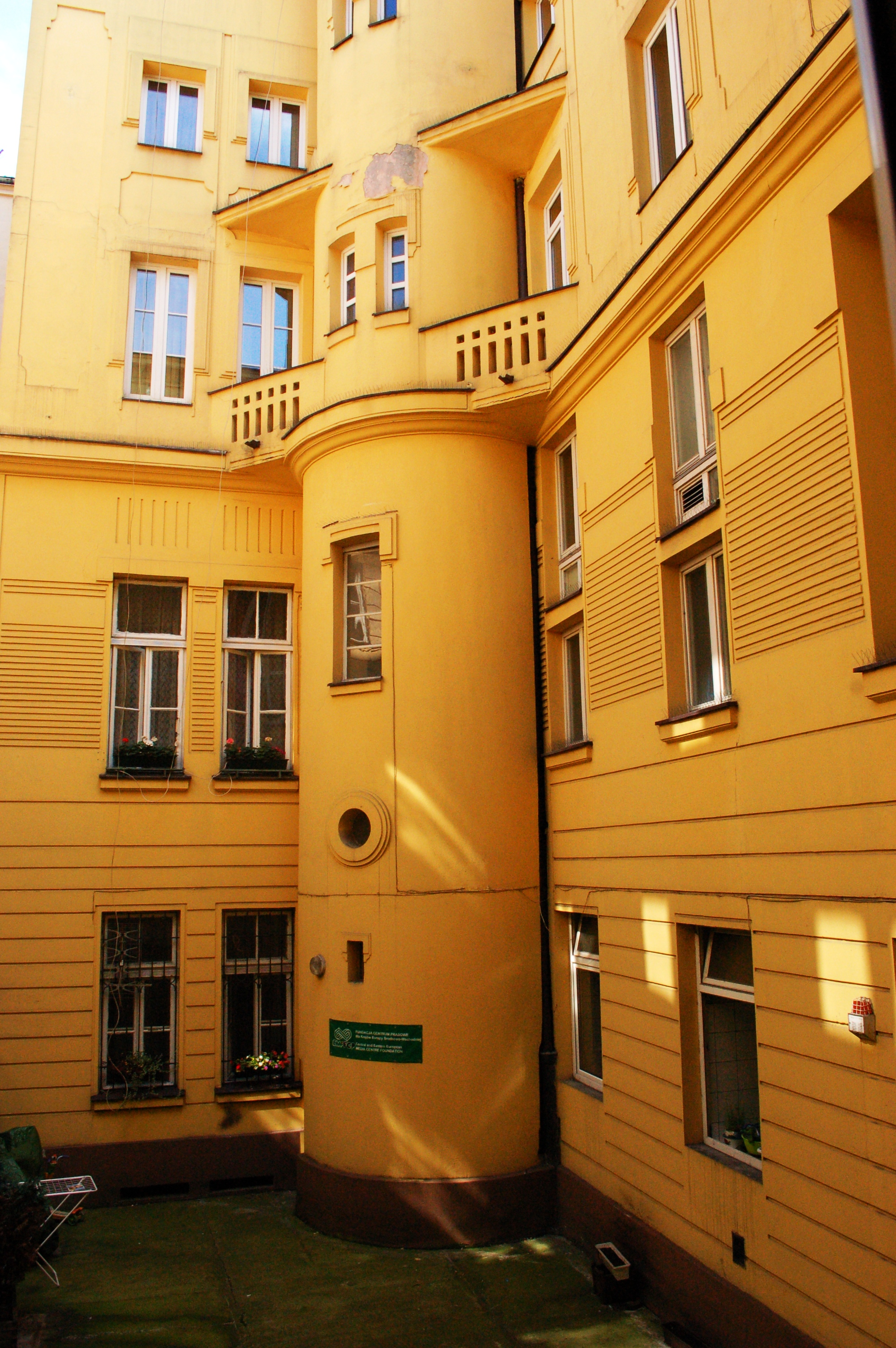 Former Hotel Savoy, Nowy Swiat, Warsaw